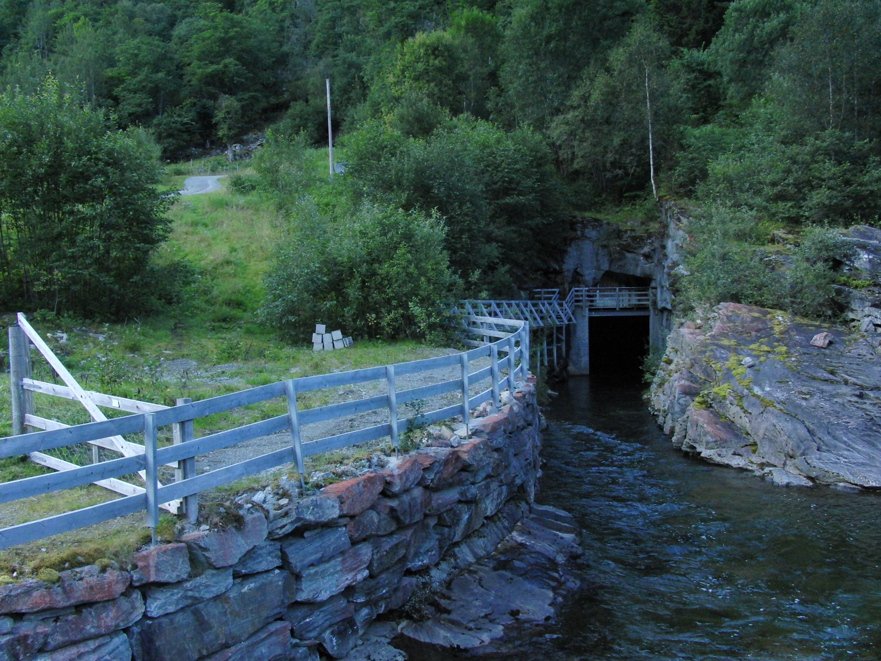 Sage kraftverk